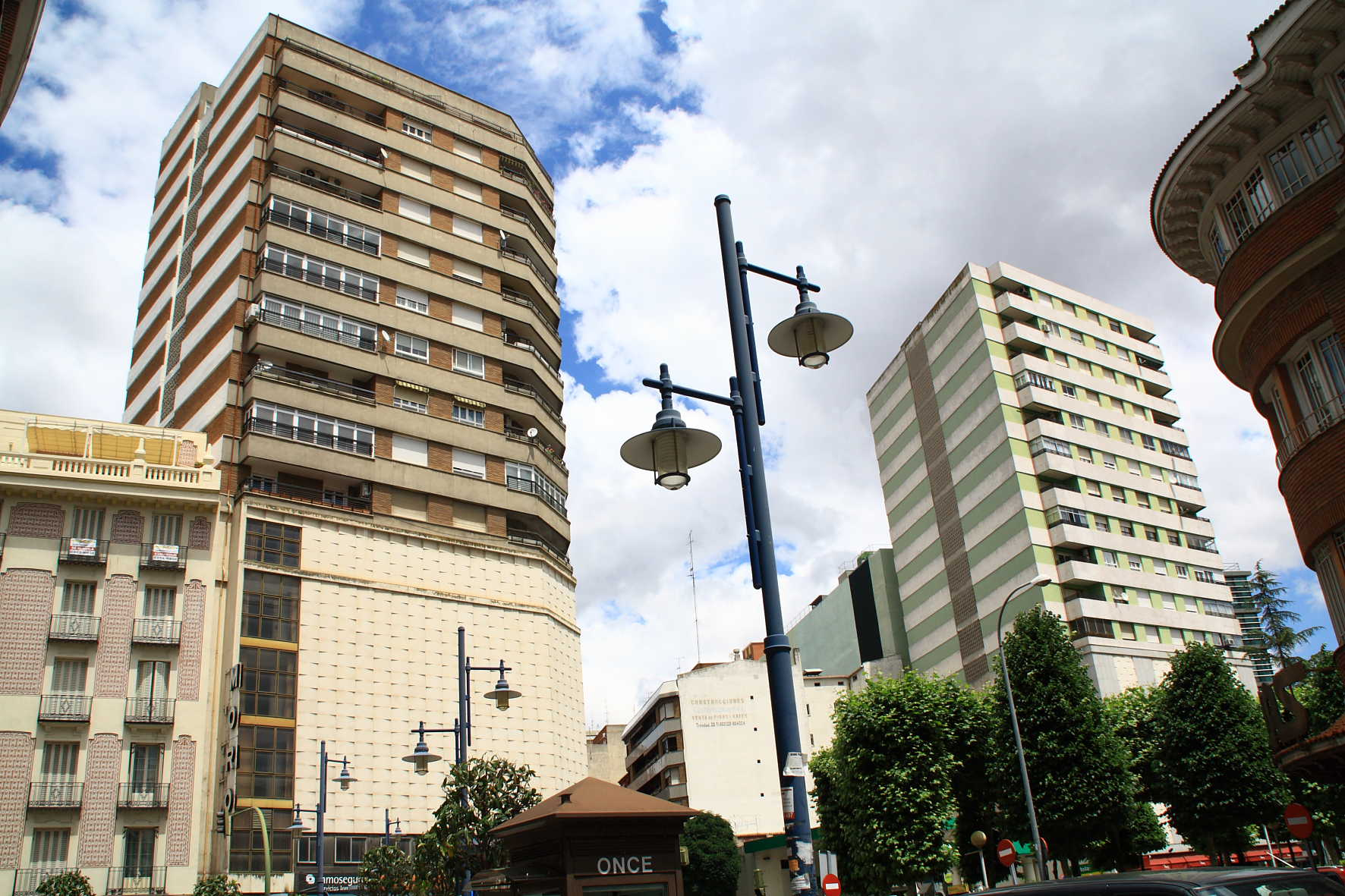 Efectos de la verticalización urbana en los años setenta en la plaza de la Trinidad de Talavera de la Reina, 2009